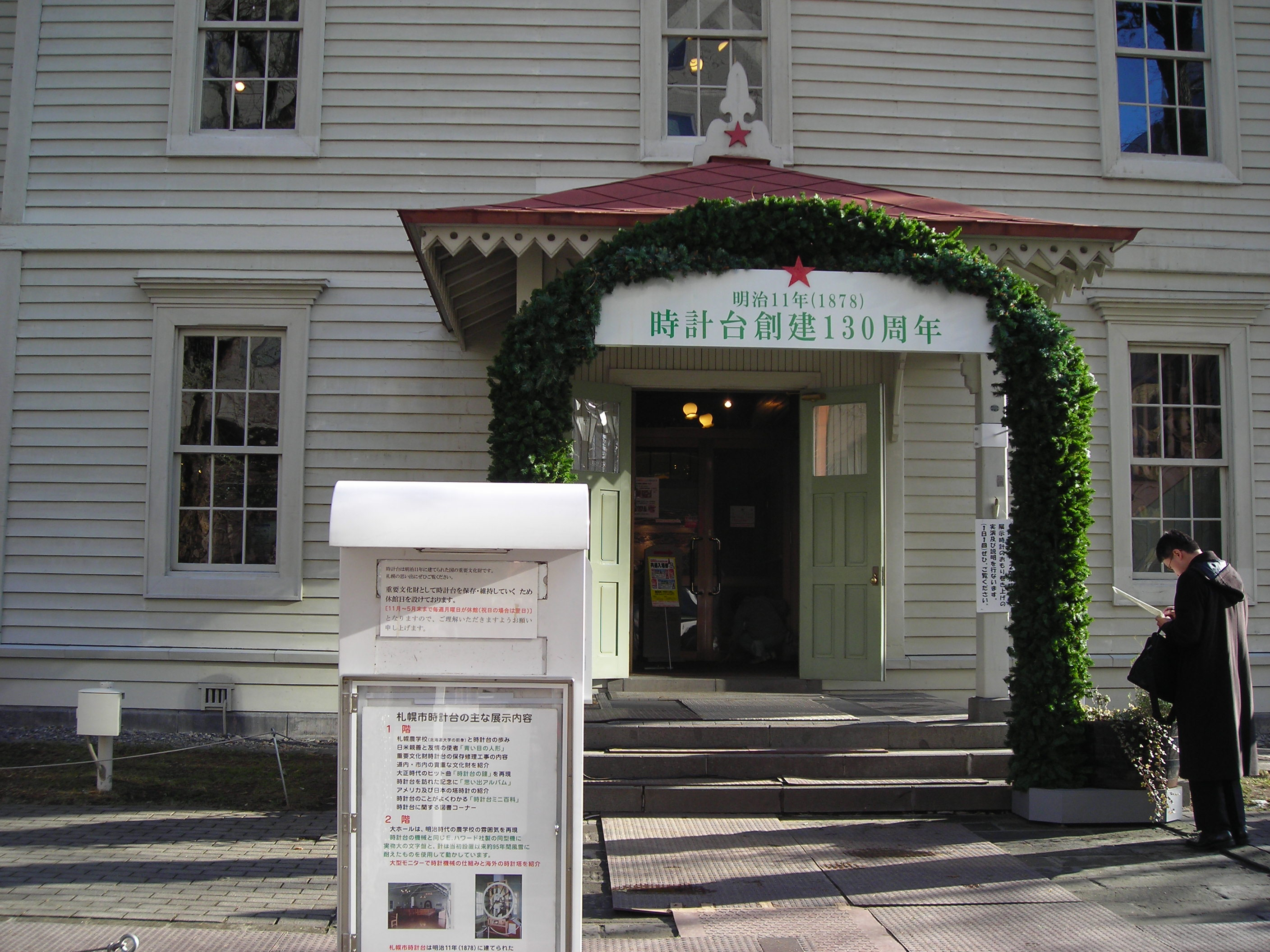 札幌市時計台130周年時の様子